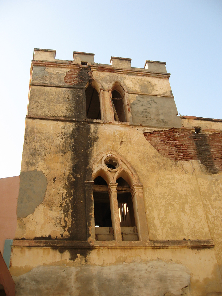 Tour en ogive d'une église édifiée en 1788 par la Compagnie du Sénégal à Saint-Louis du Sénégal, partiellement détruite, puis utilisée par l'ancienne maison commerciale Maurel et Prom